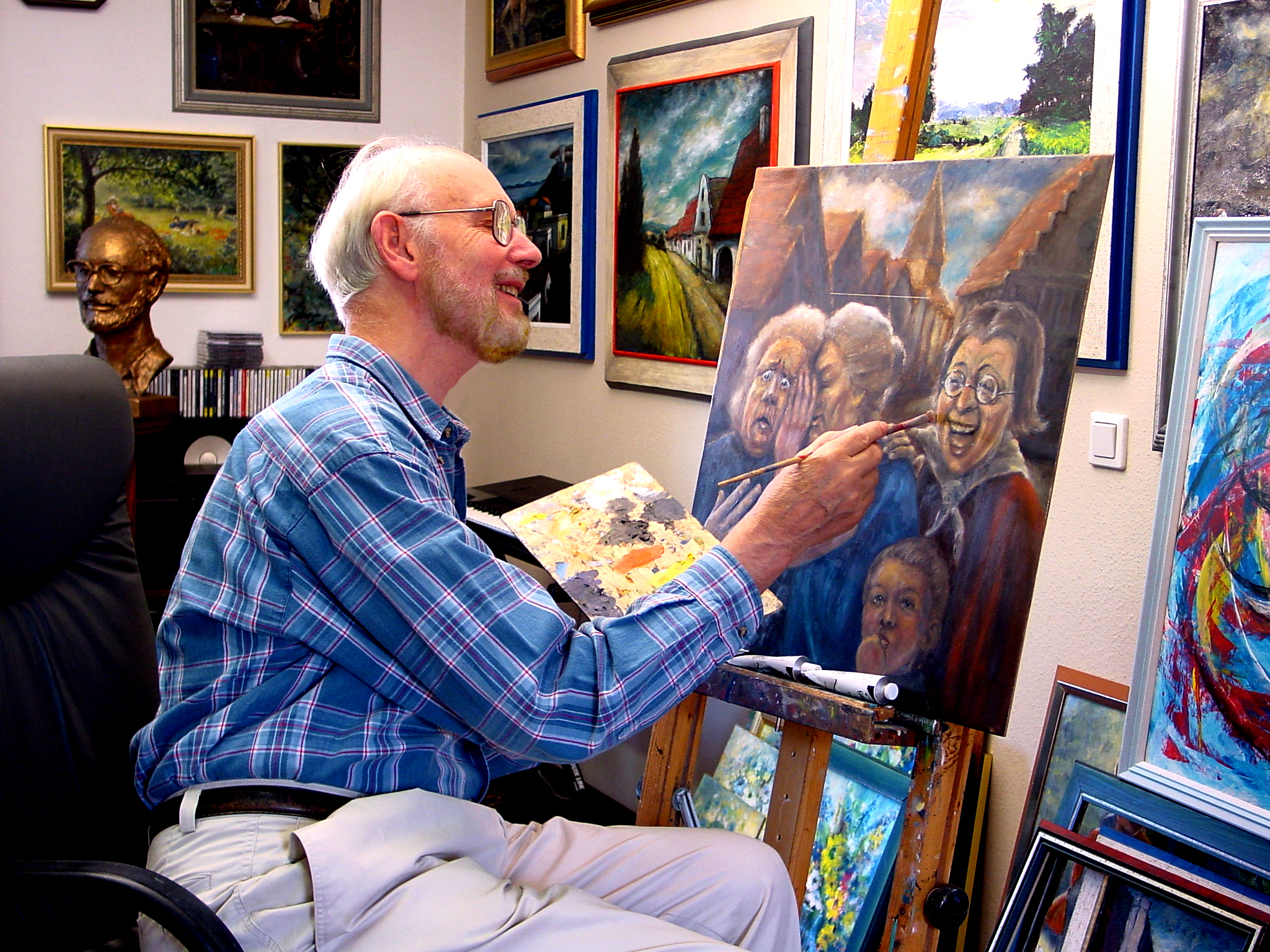 Hermann Bergmann in seinem Atelier in Neusiedl am See in Österreich